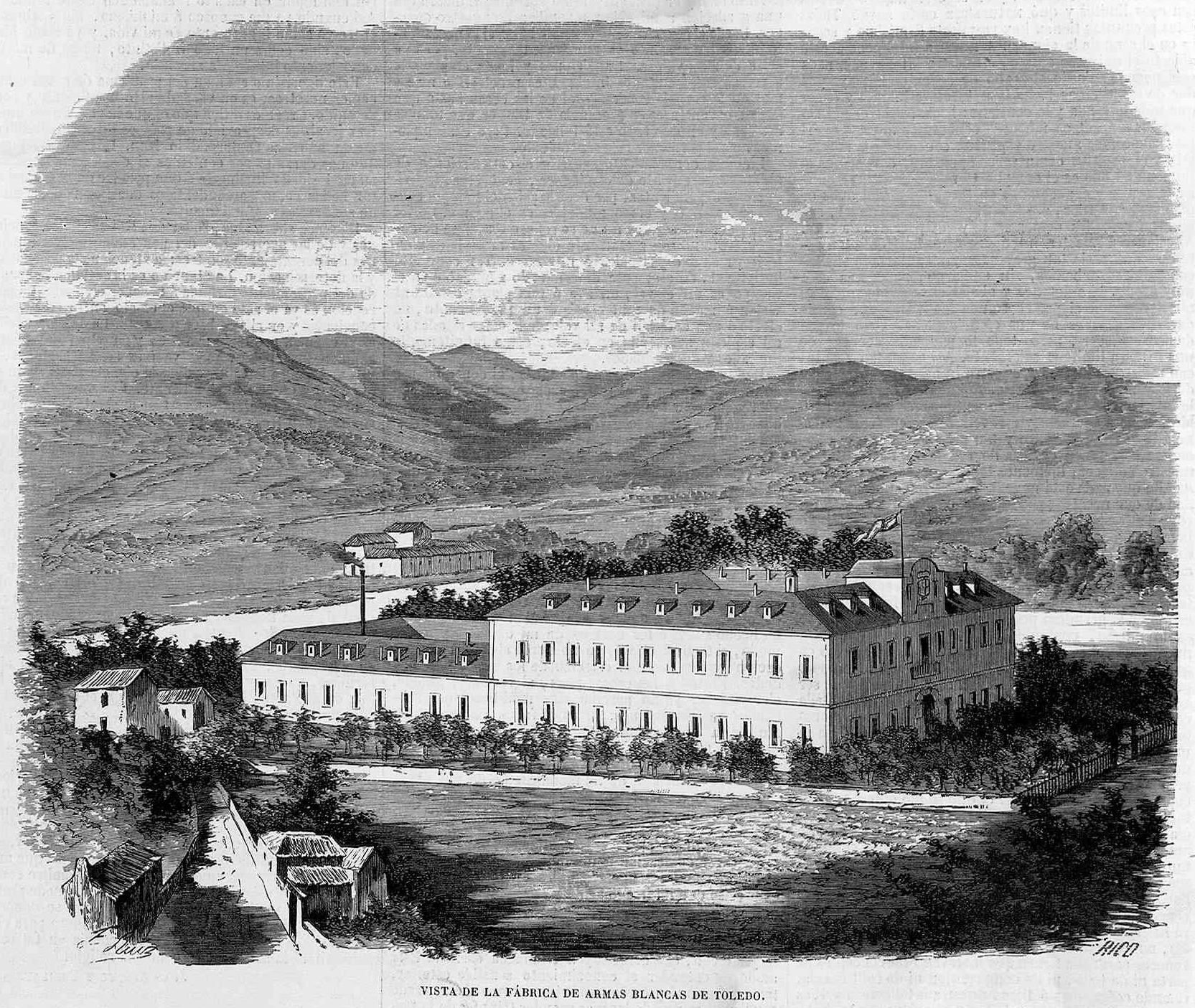 Vista de la fábrica de armas blancas de Toledo, en la revista española El Museo Universal.